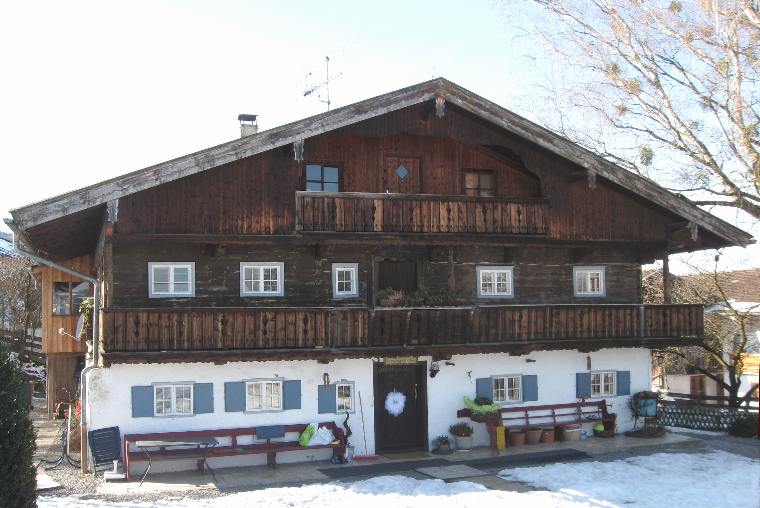 Kutterling, Wilhelm-Leibl-Straße 22; Ehem. Bauernhaus "zum Kolb", mit Blockwand-Obergeschoss, umlaufender Laube und Giebellaube; 1731; 1892 ff. Wohnhaus und Atelier von Wilhelm Leibl und Johann Sperl.